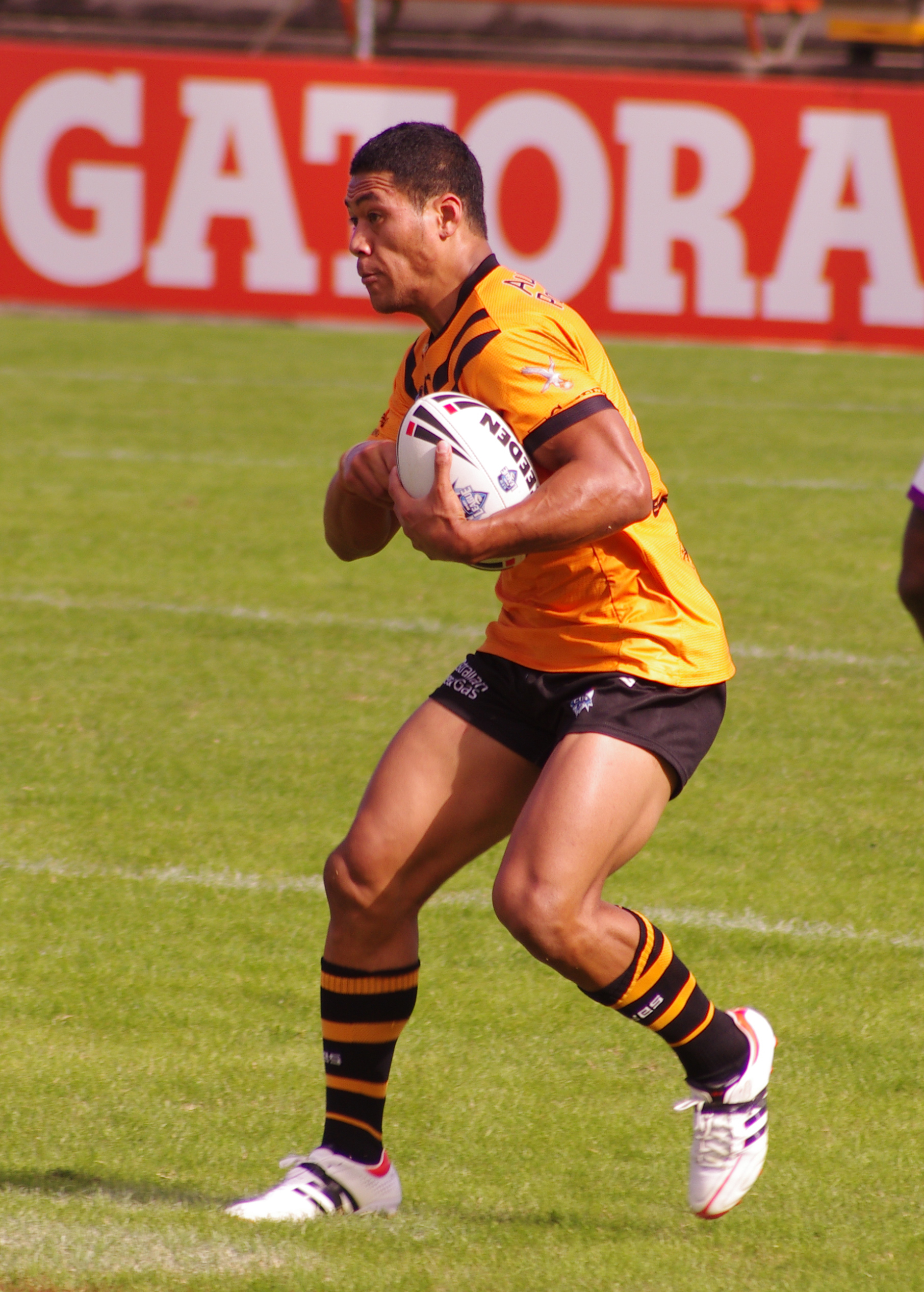 Tim simona